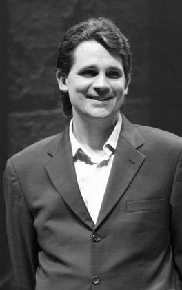 Der Jazzmusiker Jörg Achim Keller auf dem Jazzfestival St. Ingbert